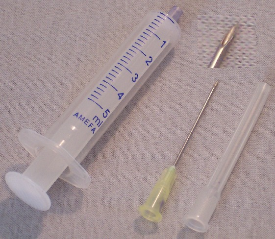 Einweg-Spritze mit Nadel